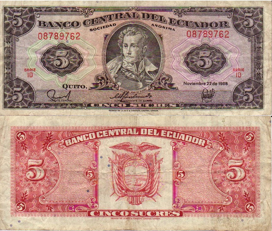 Ecuadorian 5 Sucres bill